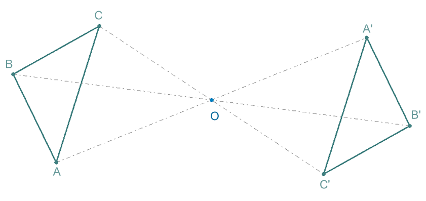 Simetría central, Simetría central de un triángulo , transformaciones isométricas, Geometry